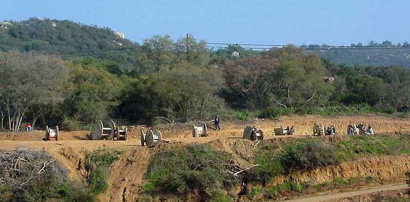 photo de paintball